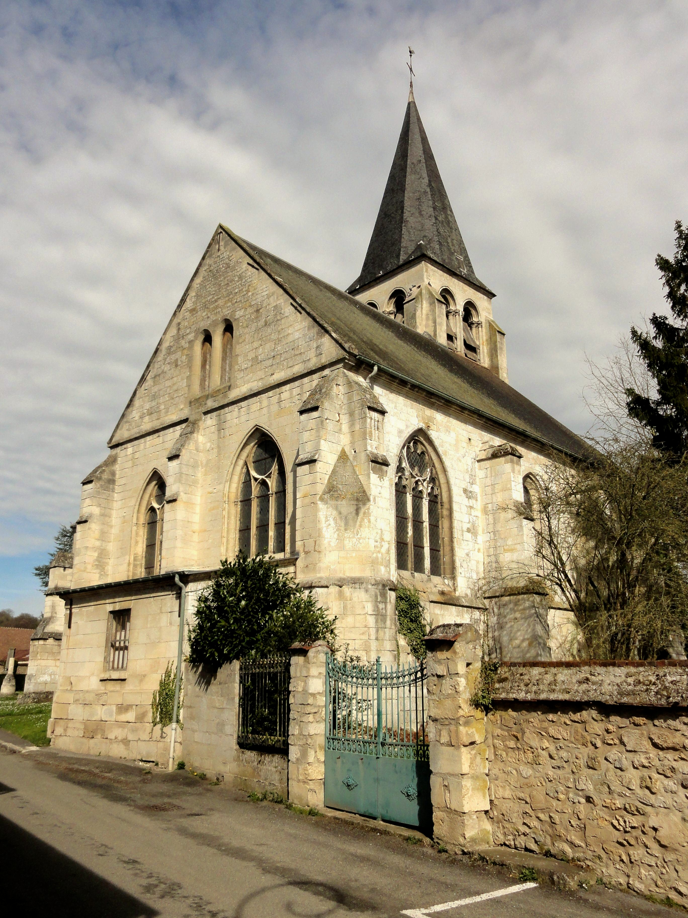 Vue depuis le sud-est.